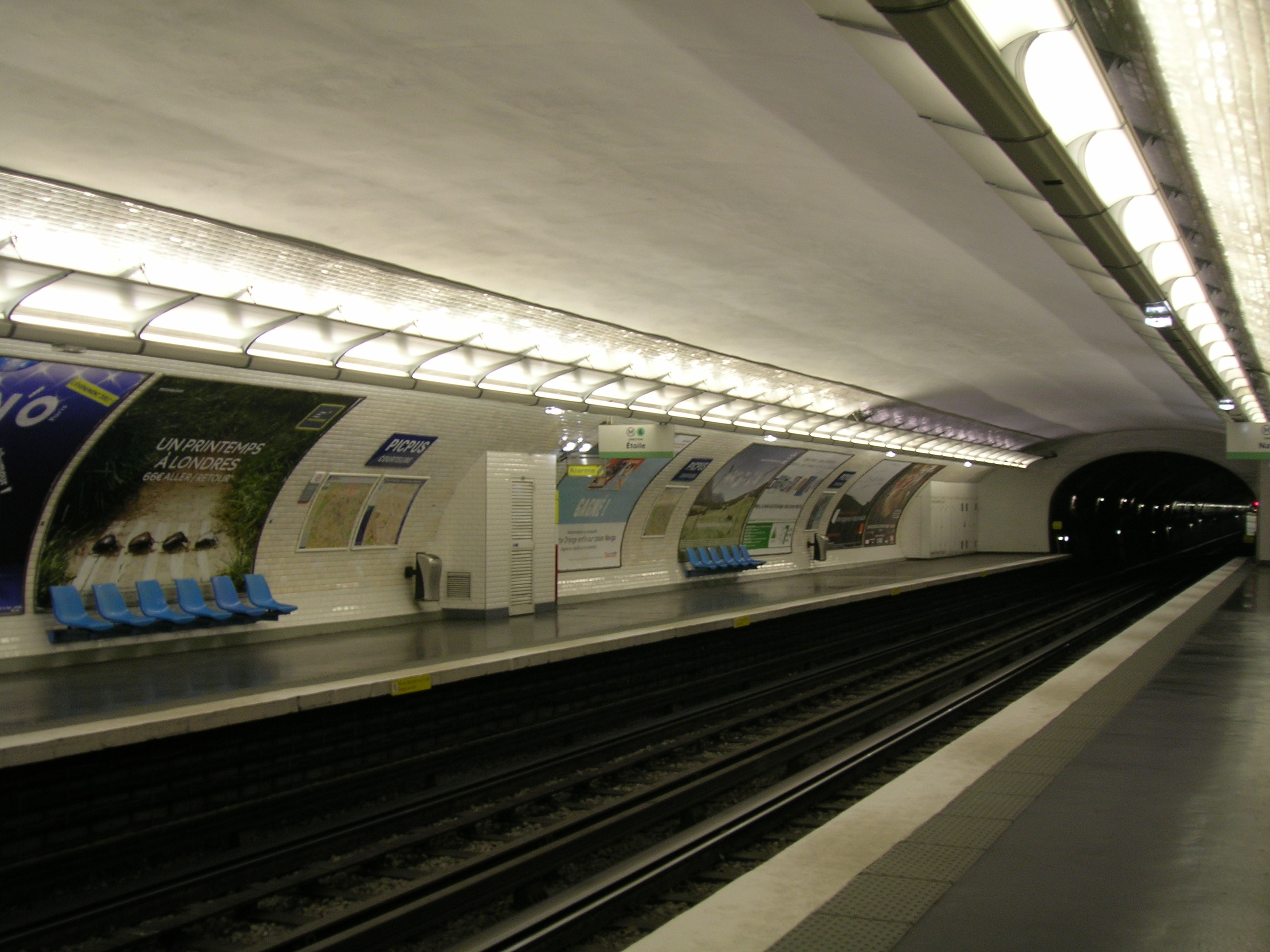 Entrée de la station de métro Picpus, ligne 6, 12e arrondissement de Paris, France